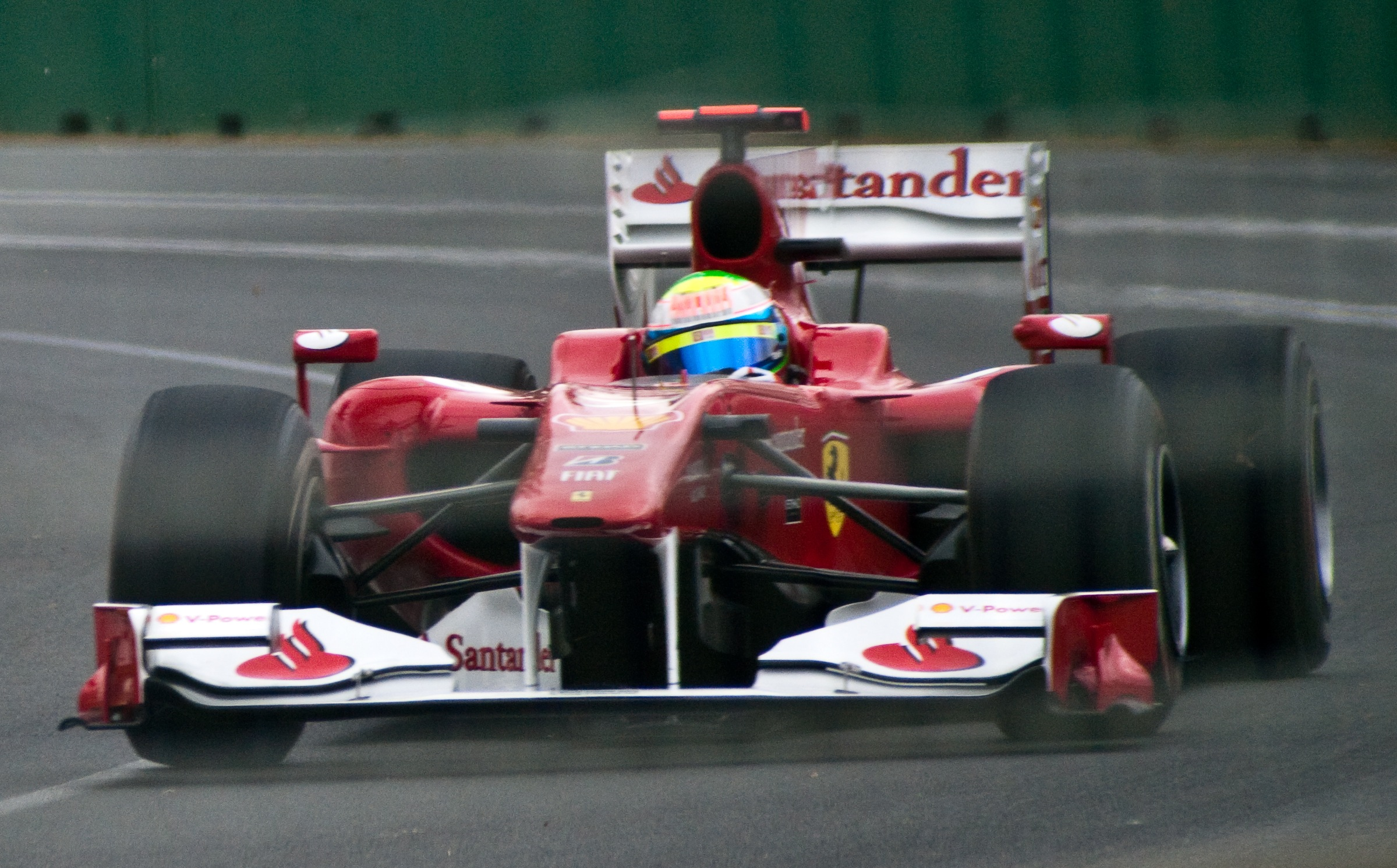 Massa Australia